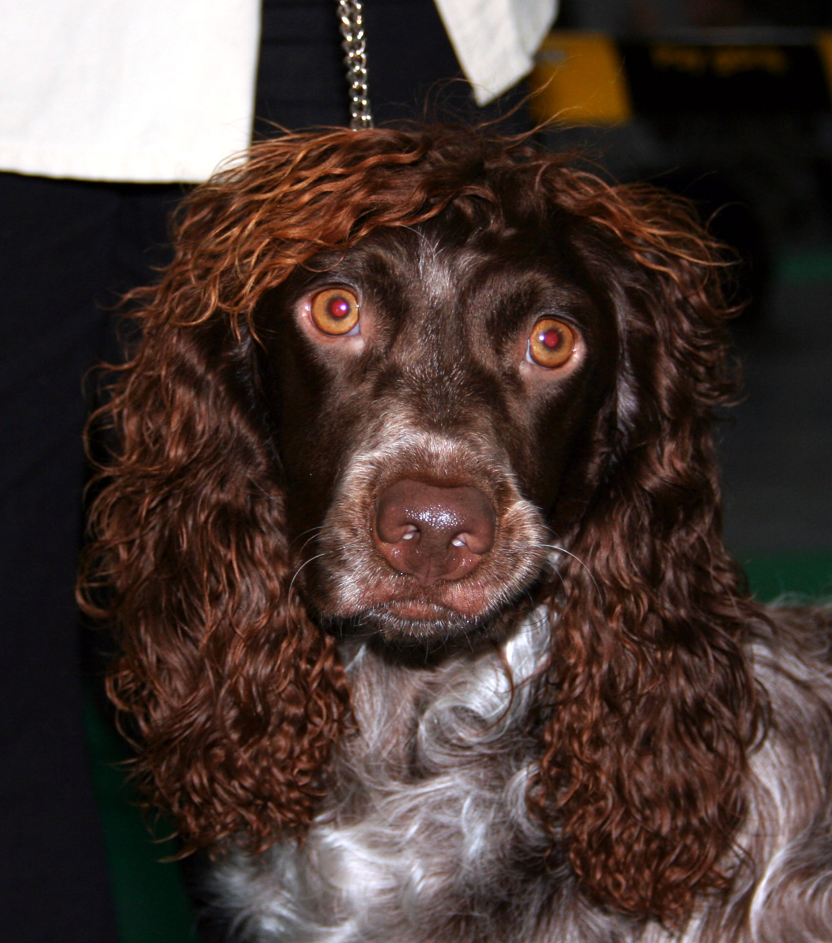 Epagneul_de_pont-audemer na Światowej Wystawie Psów Rasowych w Poznaniu